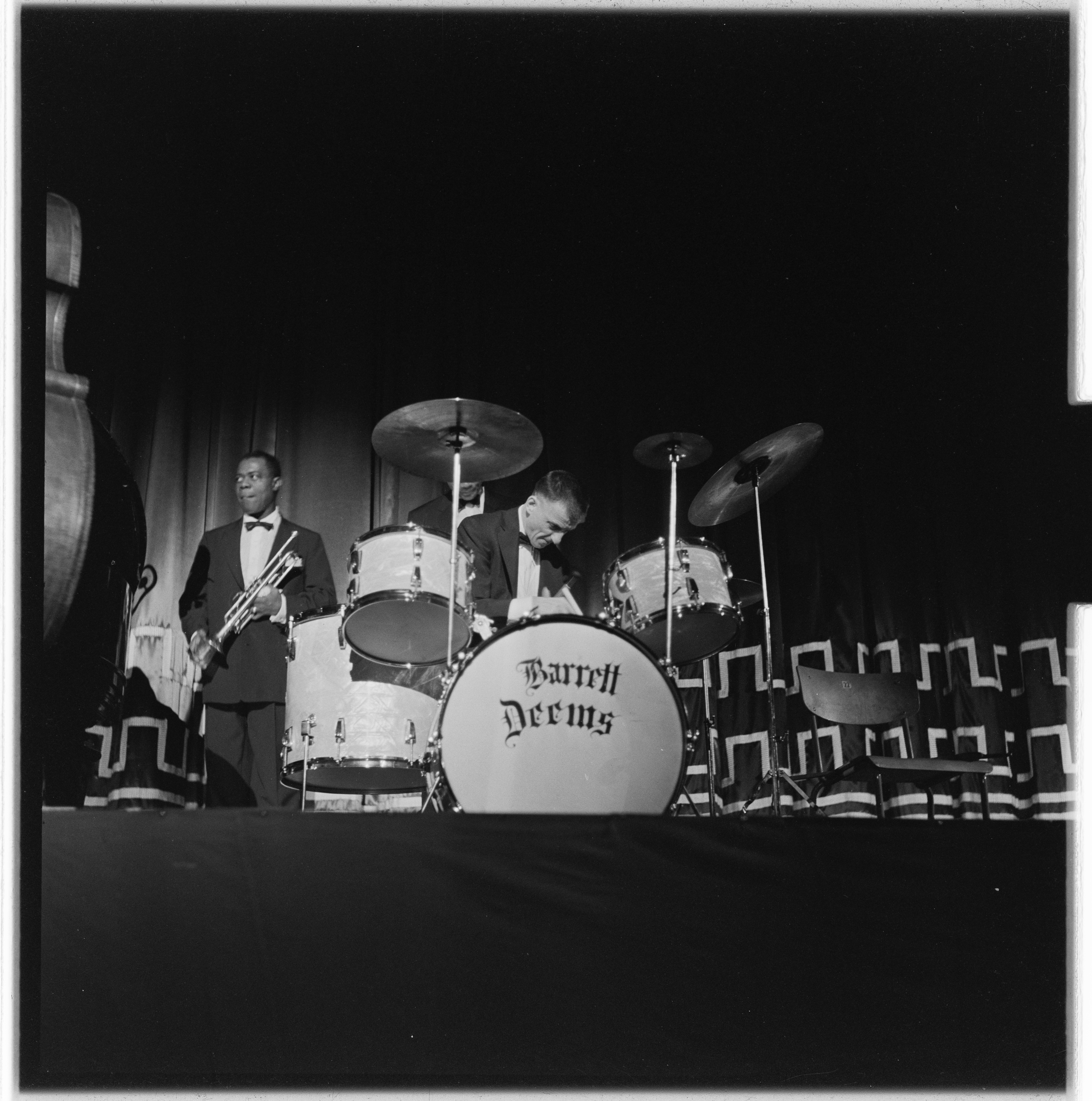 Bildet er hentet fra Arkivverket. Louis Armstrong til Oslo og konserter. NÅ nr. 42, 1955. Arkivinstitusjon : Riksarkivet Arkivnavn : Billedbladet NÅ Sted : Norge, Oslo, Oslo, Emneord: Jazz, Konsert, Musikk Avbildet